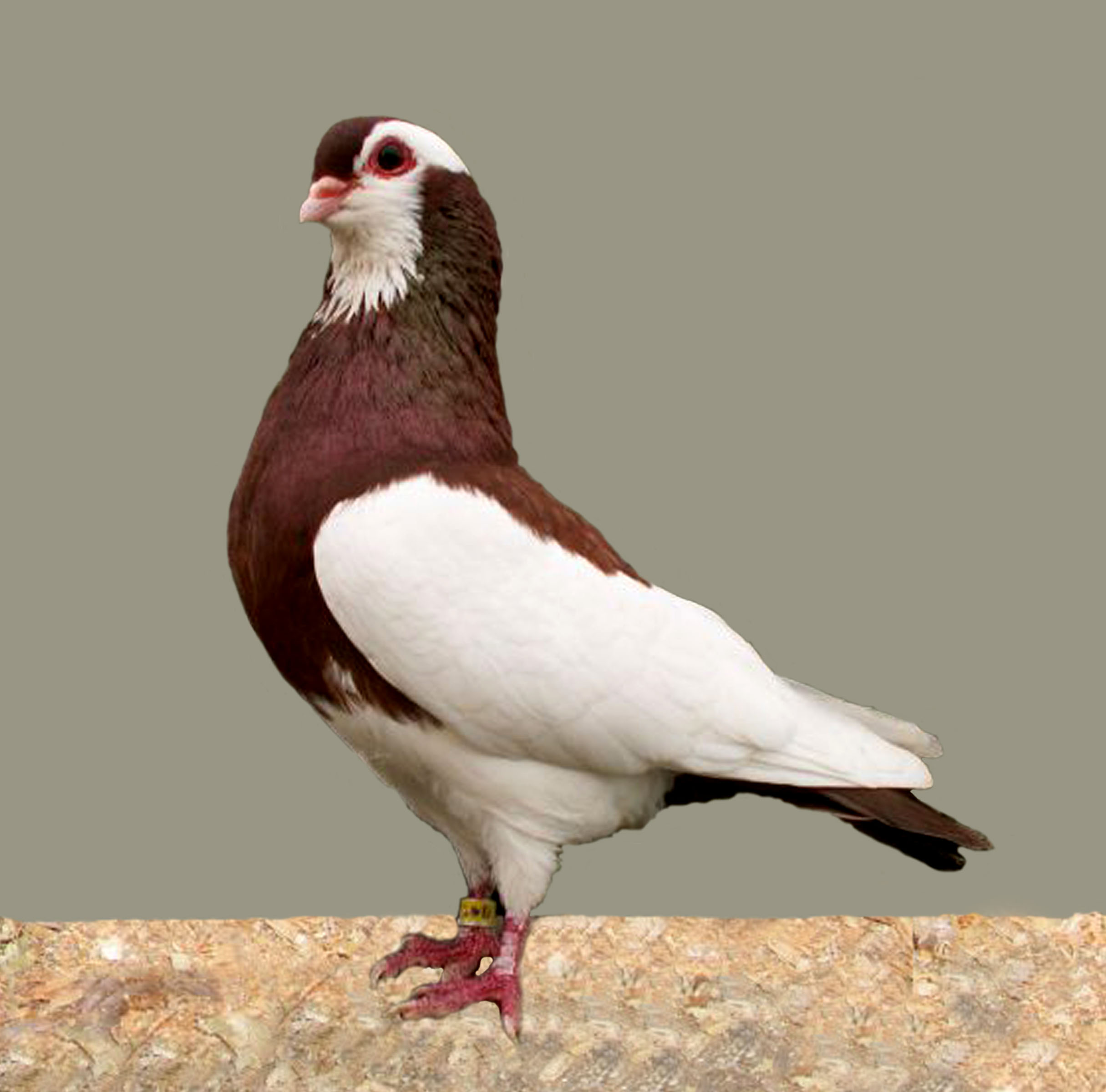 Rakovnik Roller (Red Magpie-Marked)